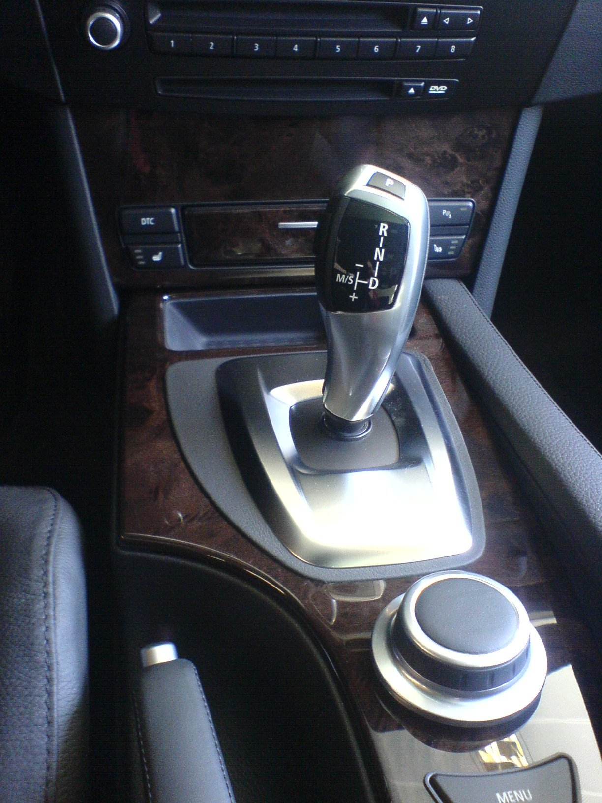 BMW Alpina B3 (Bj. 2008): Wählhebel für das Automatikgetriebe